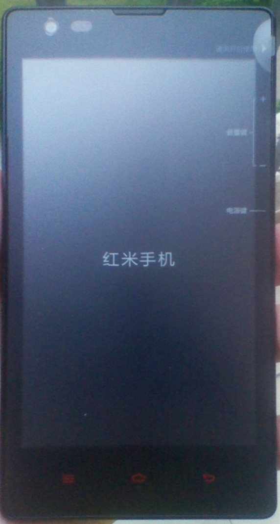 红米手机1S